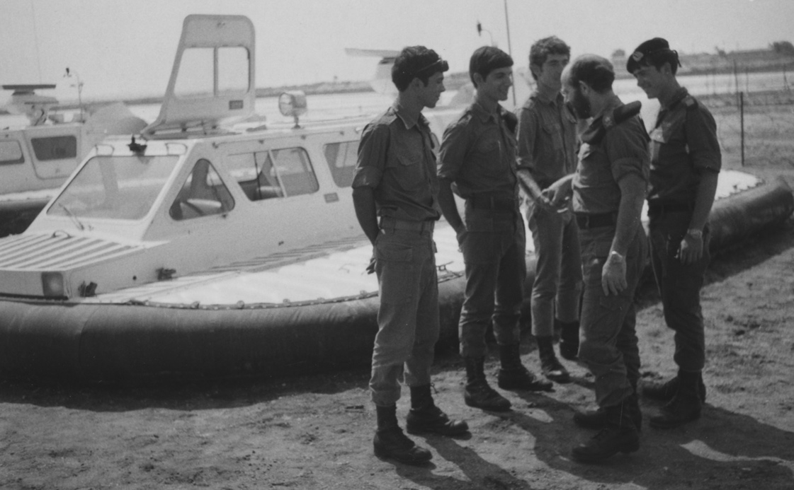 מפקד חיל הים אלוף מיכאל ברקאי מבקר את צוות הרחפות